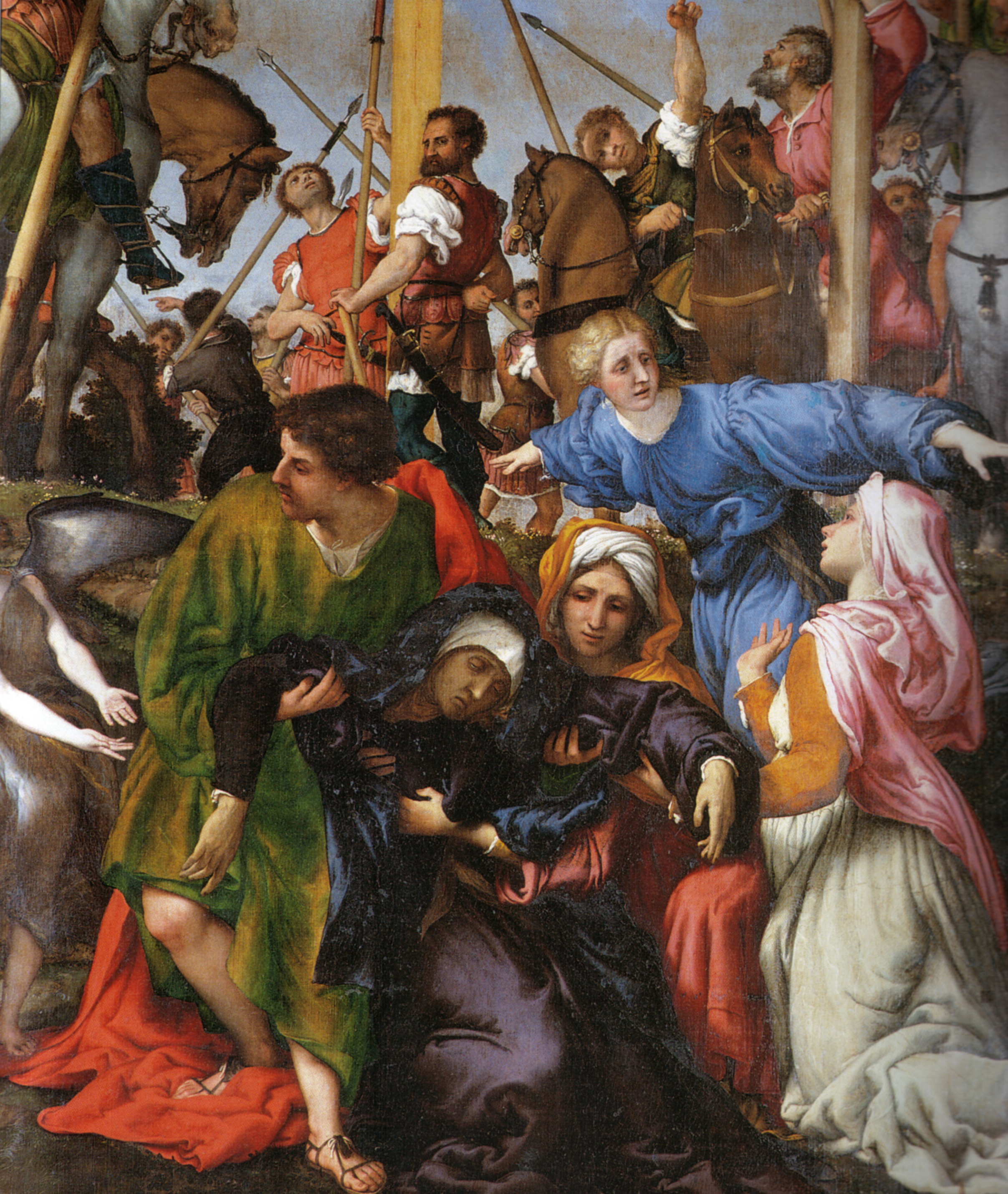 detail